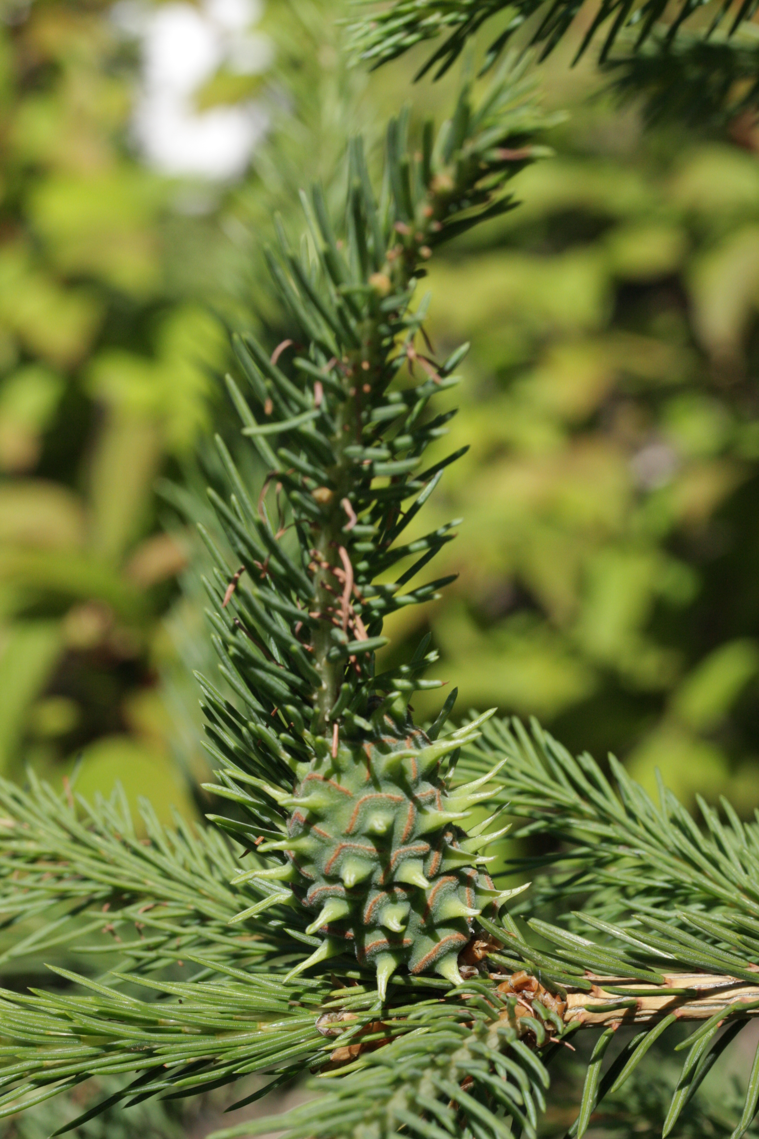 Galle am Zweig einer Fichte, entstanden durch den Befall mit Fichtengallenläusen